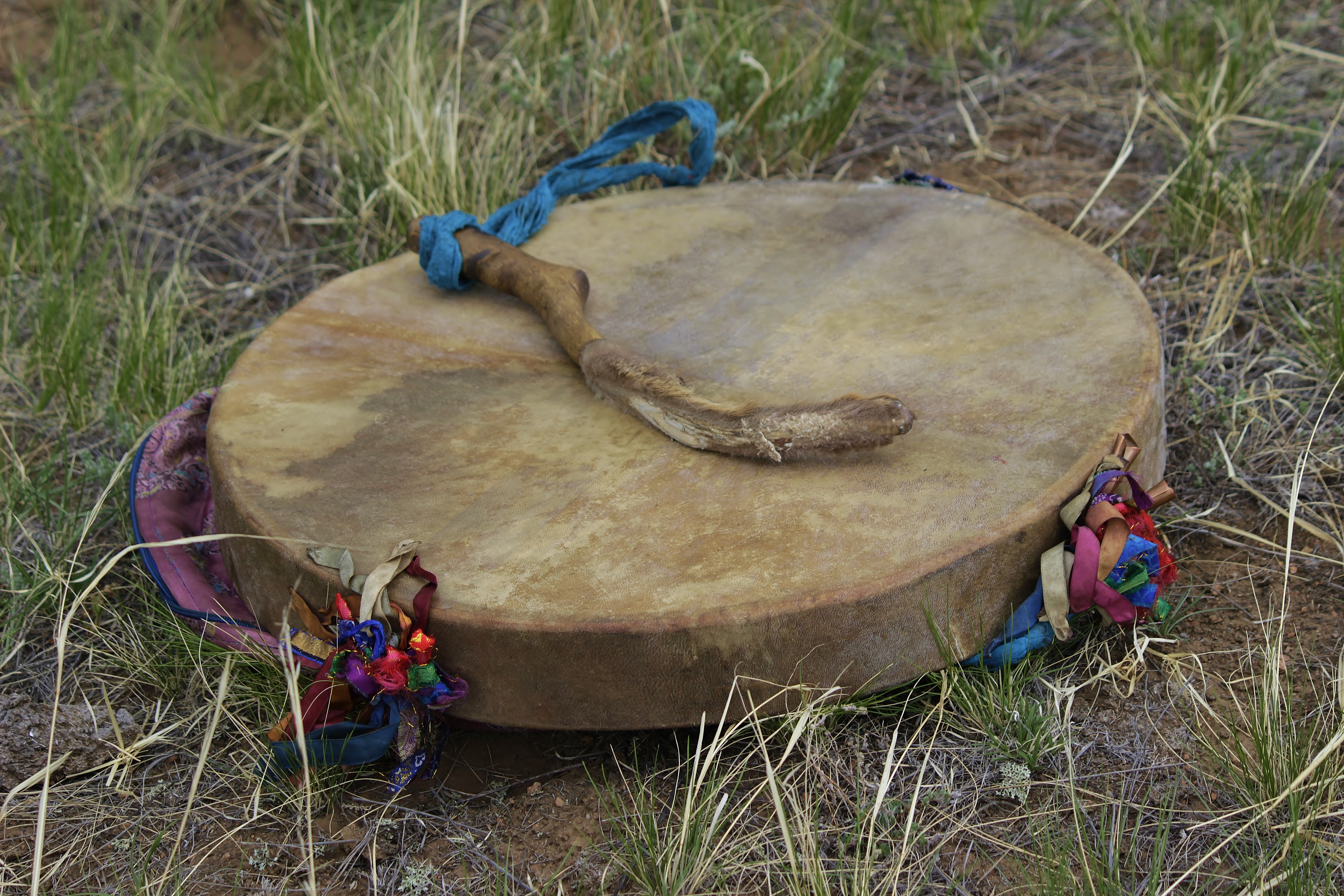 Шаманский бубен. Обряд на горе Тологой. Бурятия